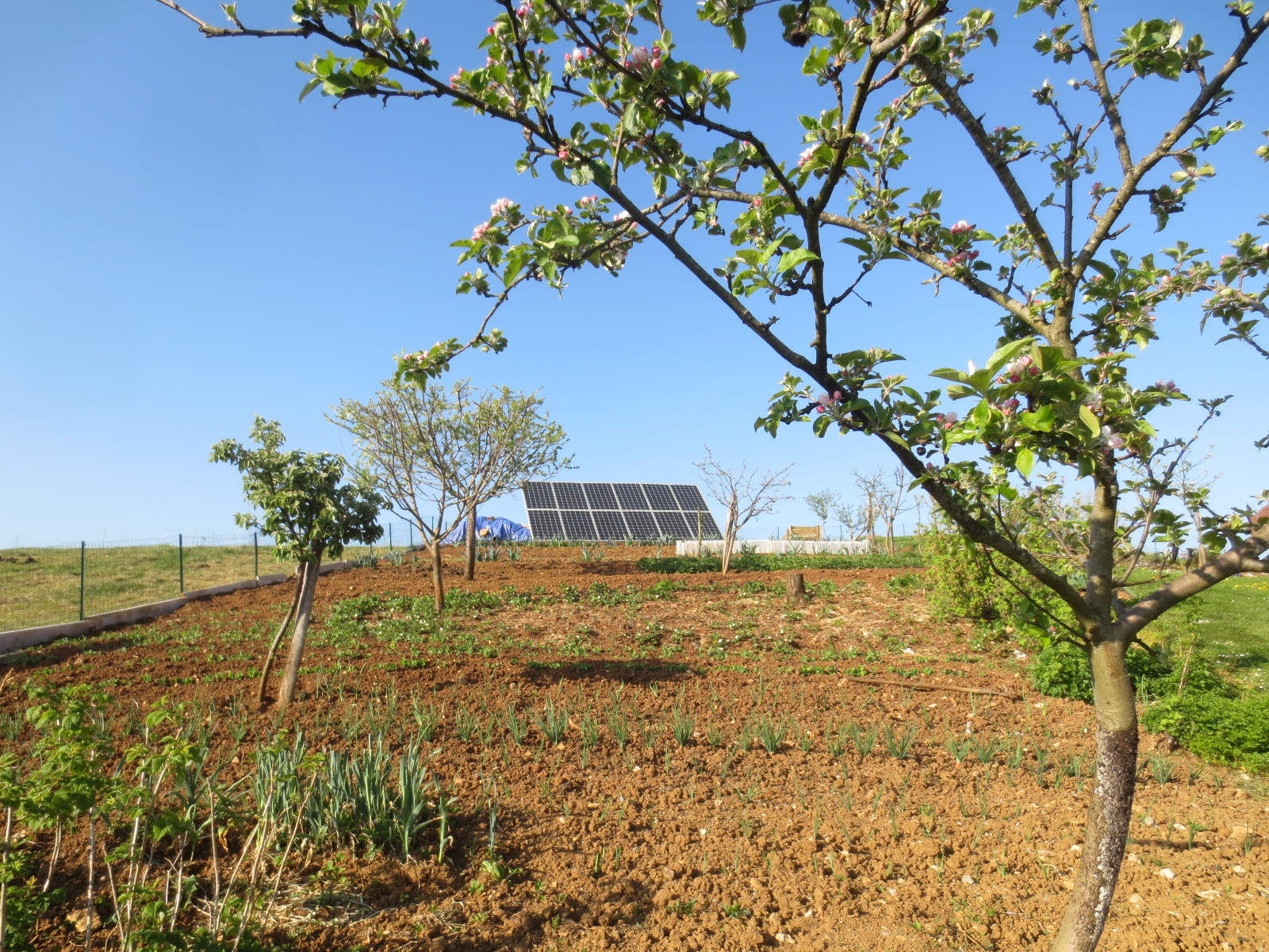 Solar cell panels on roofs in France